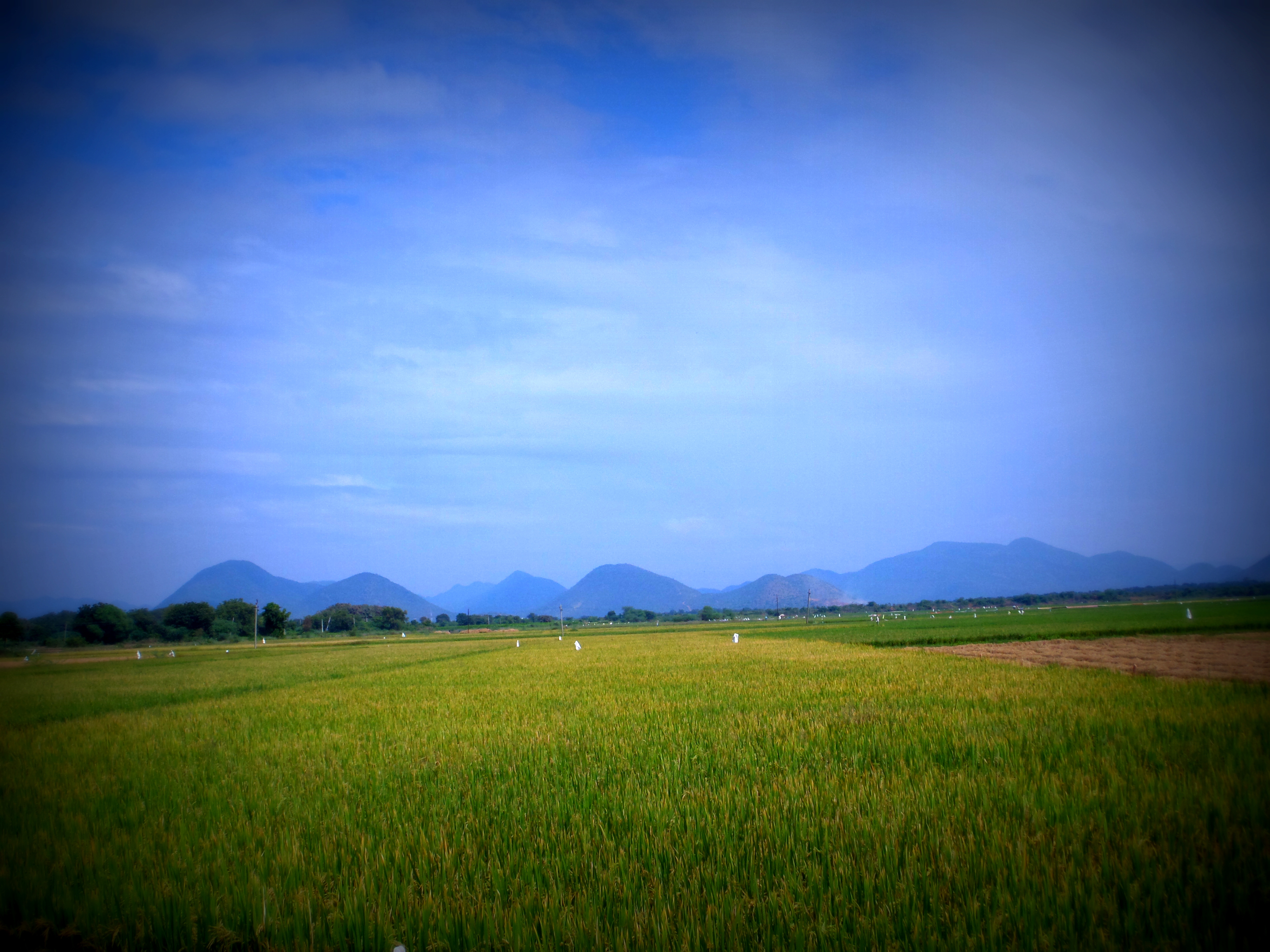 ripening paddies!kalasipadu,kadapa,A.P